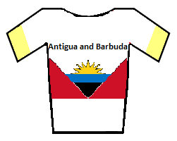 Wielertrui van de nationale kampioen van Antigua en Barbuda